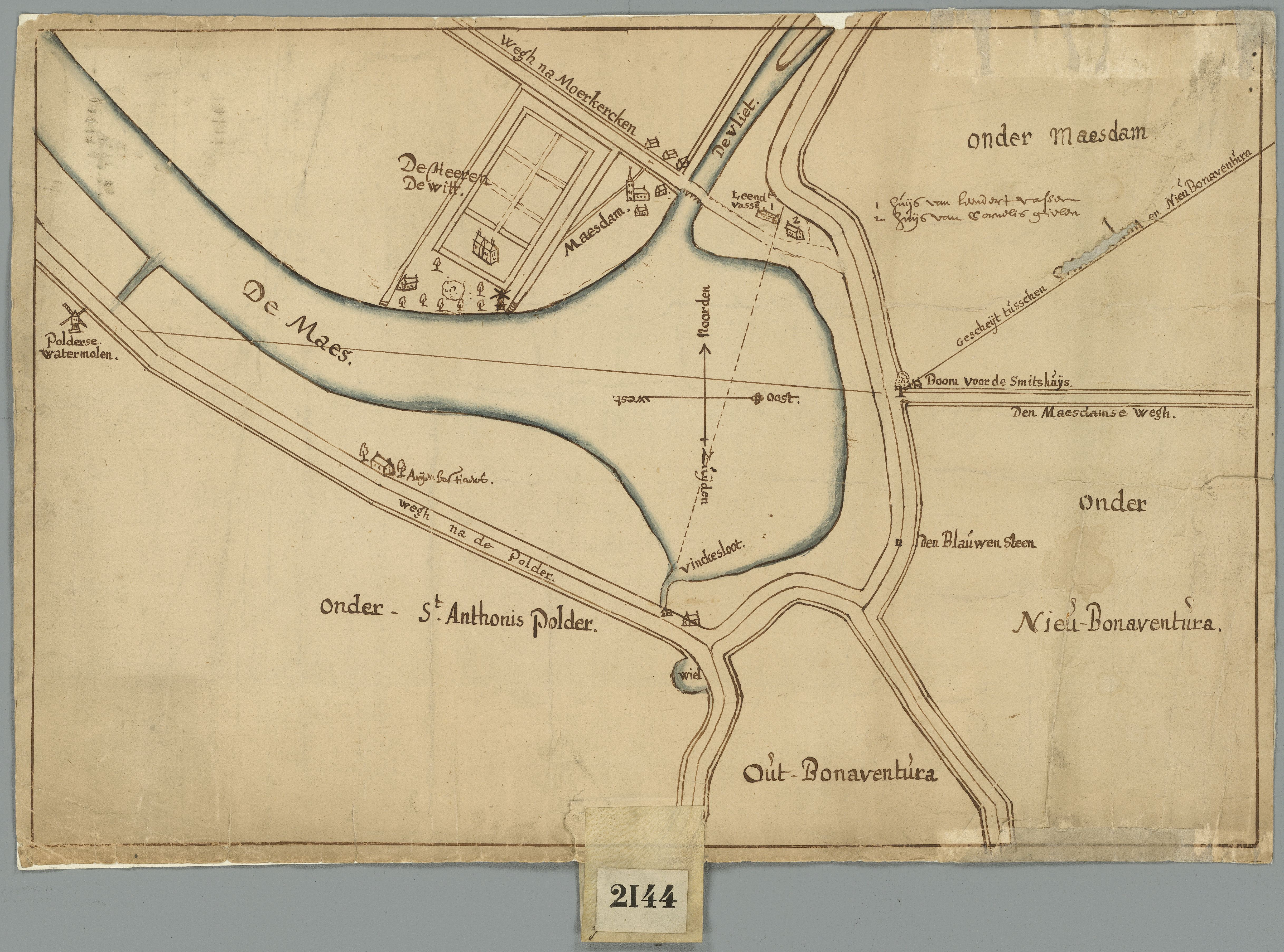 Een kaart van het dorp Maasdam uit omstreeks 1750. Op de kaart is onder andere te zien de buitenplaats "Maas en Veldlust", ook wel "Resenburgh" genoemd.